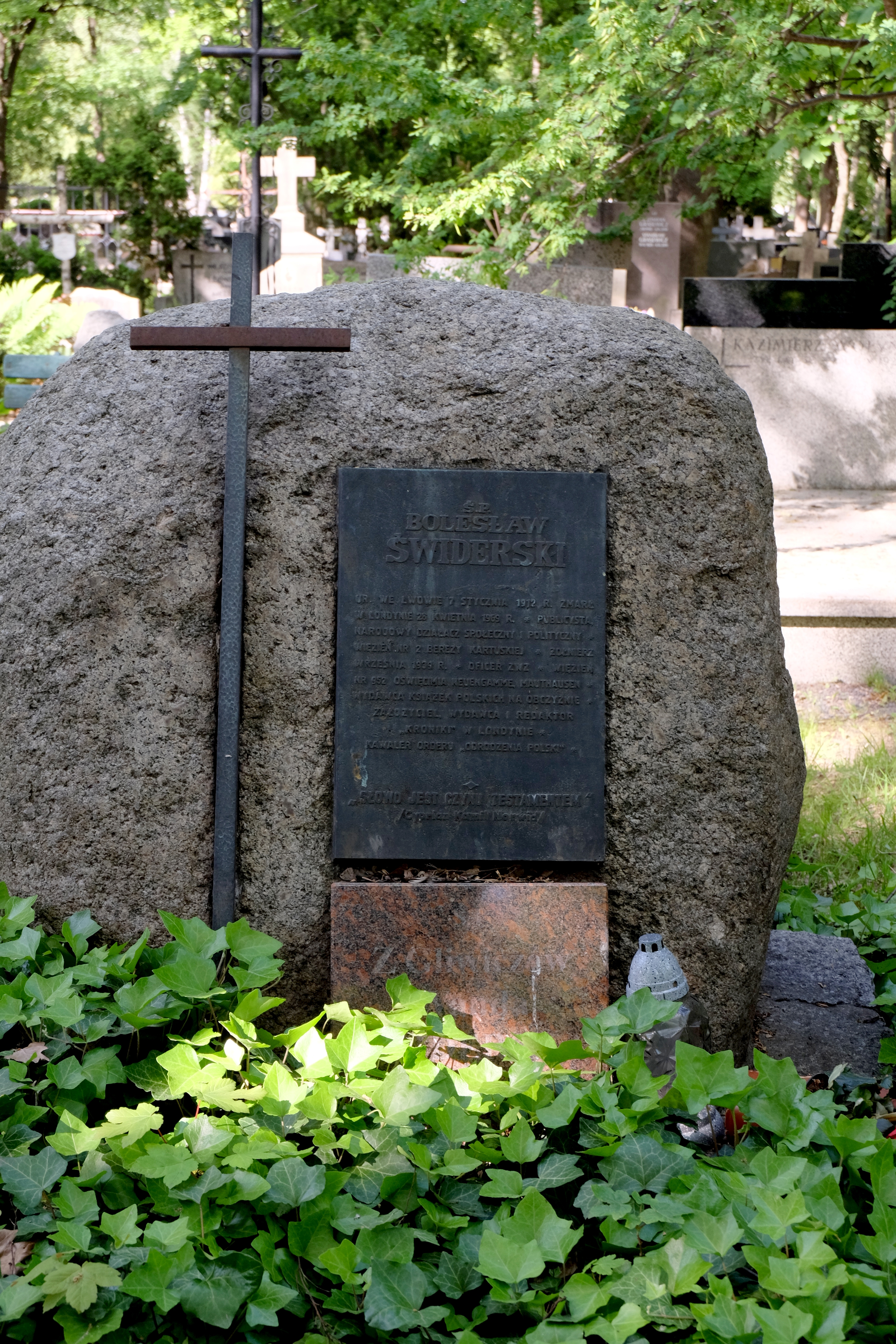 Grób działacza narodowego Bolesława Świderskiego na Cmentarzu Wojskowym na Powązkach w Warszawie